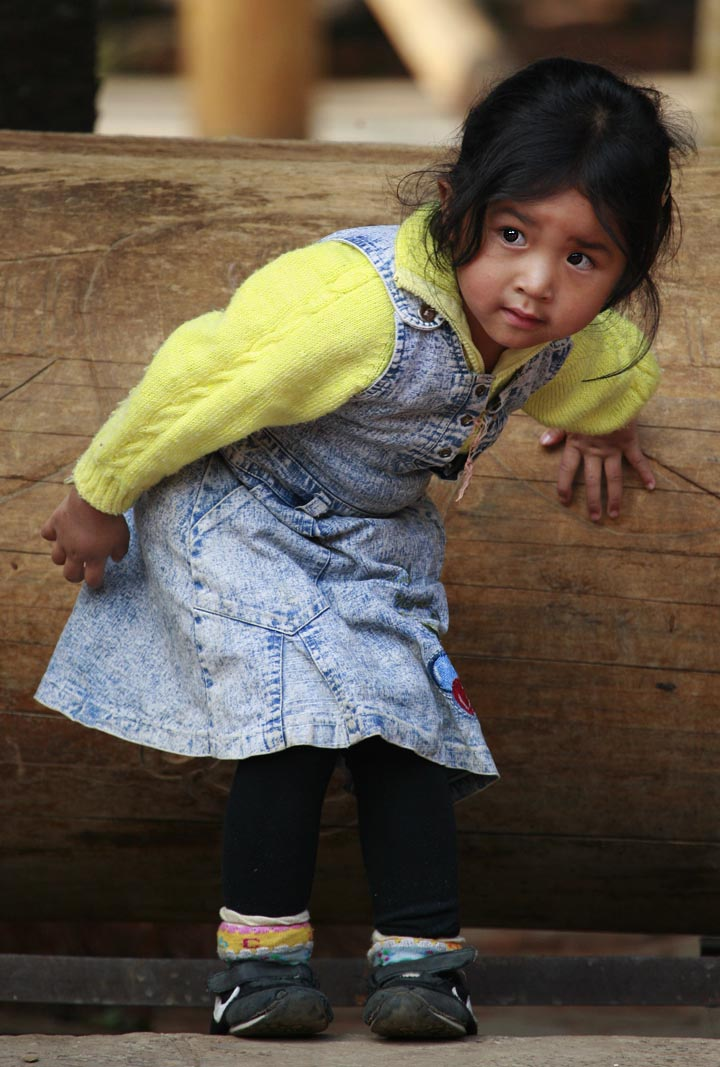 China